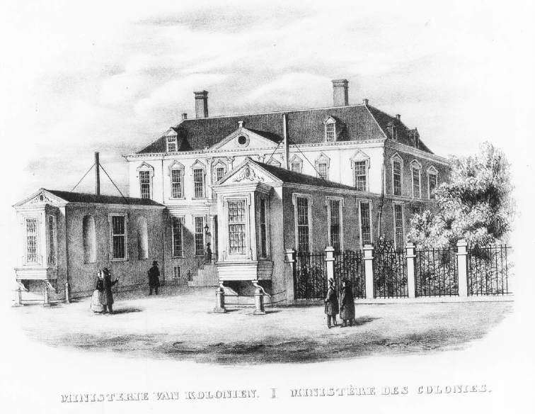 Het Ministerie van Koloniën aan het Plein. Prent. lithografie in kleur